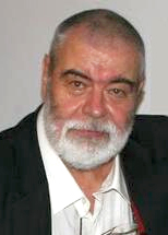 Radu Gabrea la lansarea filmului Calatoria Lui Gruber.